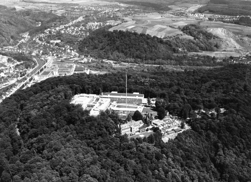 Saarbrücken Saarländischer Rundfunk (Luftbild) Aufn. Stuttgarter Luftbild Elsäßer+Co.